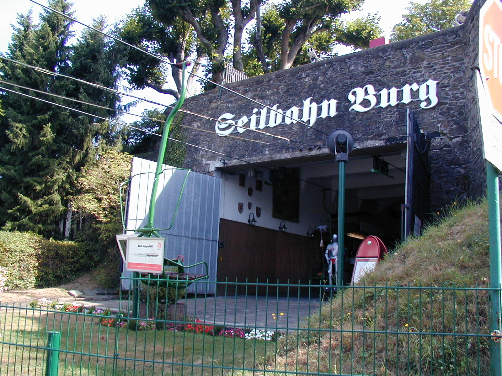 Bergstation der Seilbahn auf Schloss Burg 2003 selbst fotografiert